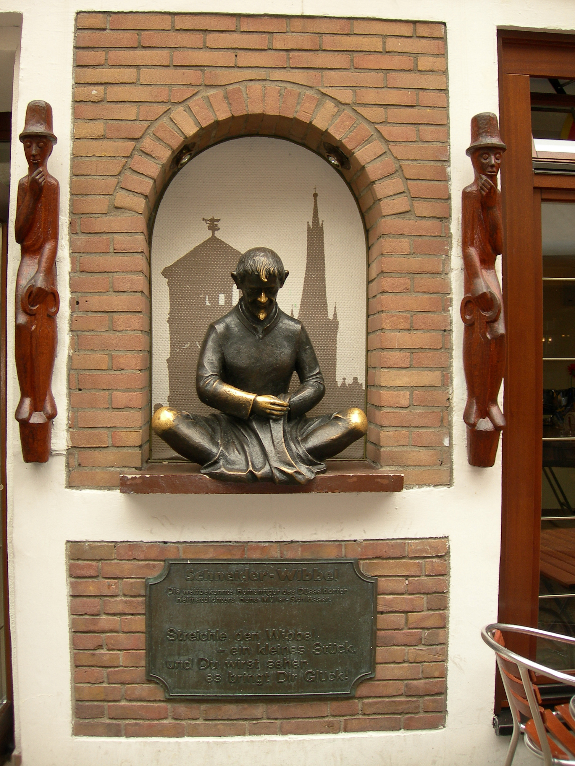 Schneider Wibbel, Düsseldorf, Germany